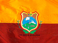 Bandera de la Paroquia de San Antonio de Pichincha